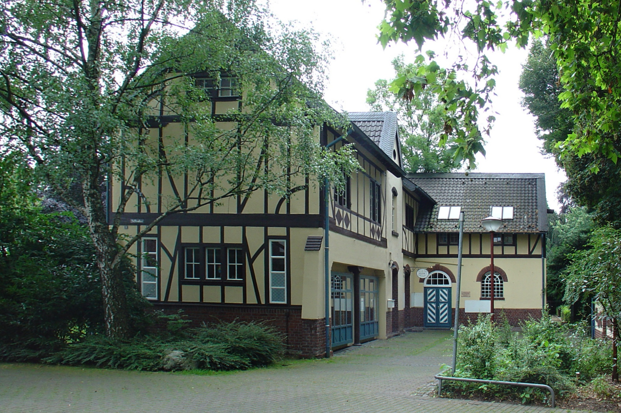 Hilden, Hofstraße 6, erbaut 1902 als Kutscherhaus des Fabrikanten Fritz Gressard, heute Haus Hildener Künstler H6 This is a photograph of an architectural monument.